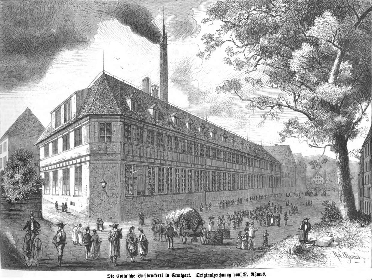 Ansicht der Cottaschen Buchdruckerei in Stuttgart im 19. Jh.